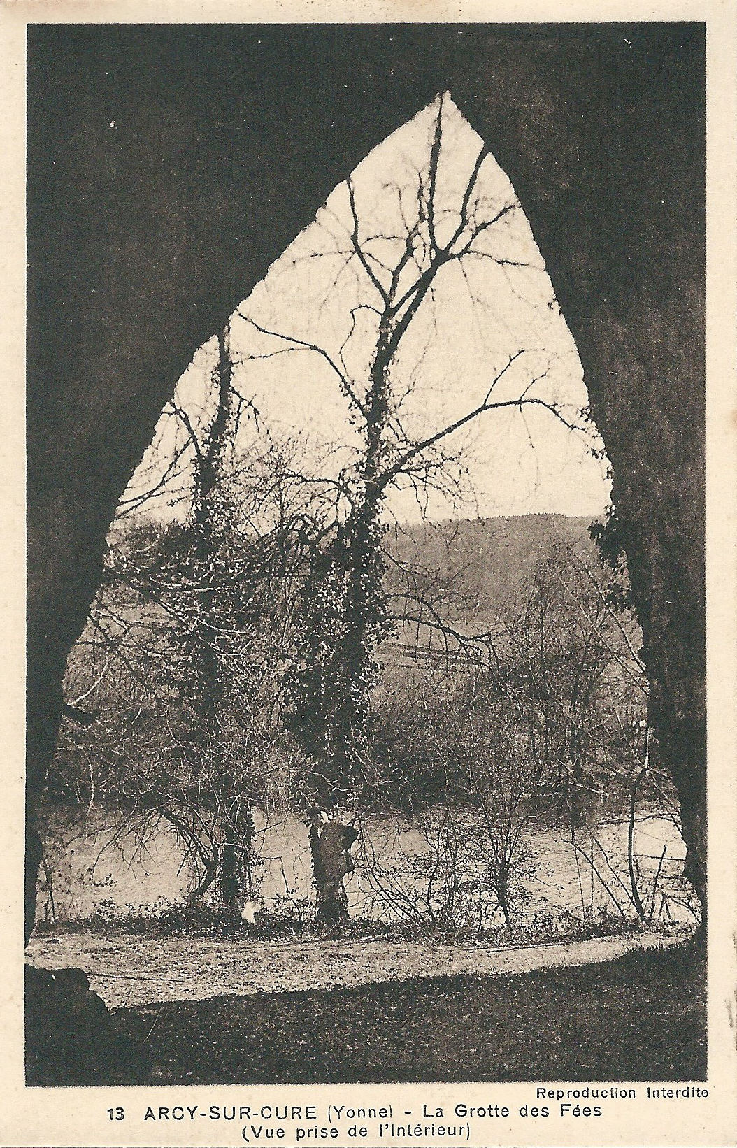 Arcy-sur-Cure (Yonne, France) ; carte postale de l'entrée de la grotte des Fées avec la rivière Cure, vers 1937 (et avant 1939)